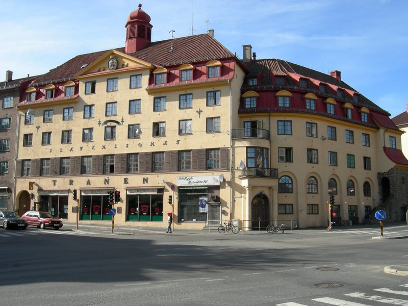 Waldemar Thranes gate 70 sto ferdig 1921 i nordisk nybarokk stil, som hybelhus for kvinner, nå blant annet Ila pensjonat, Værestedet Café Trappa (lavterskeltilbud for rusmisbrukere) og serveringsstedet Tranen.